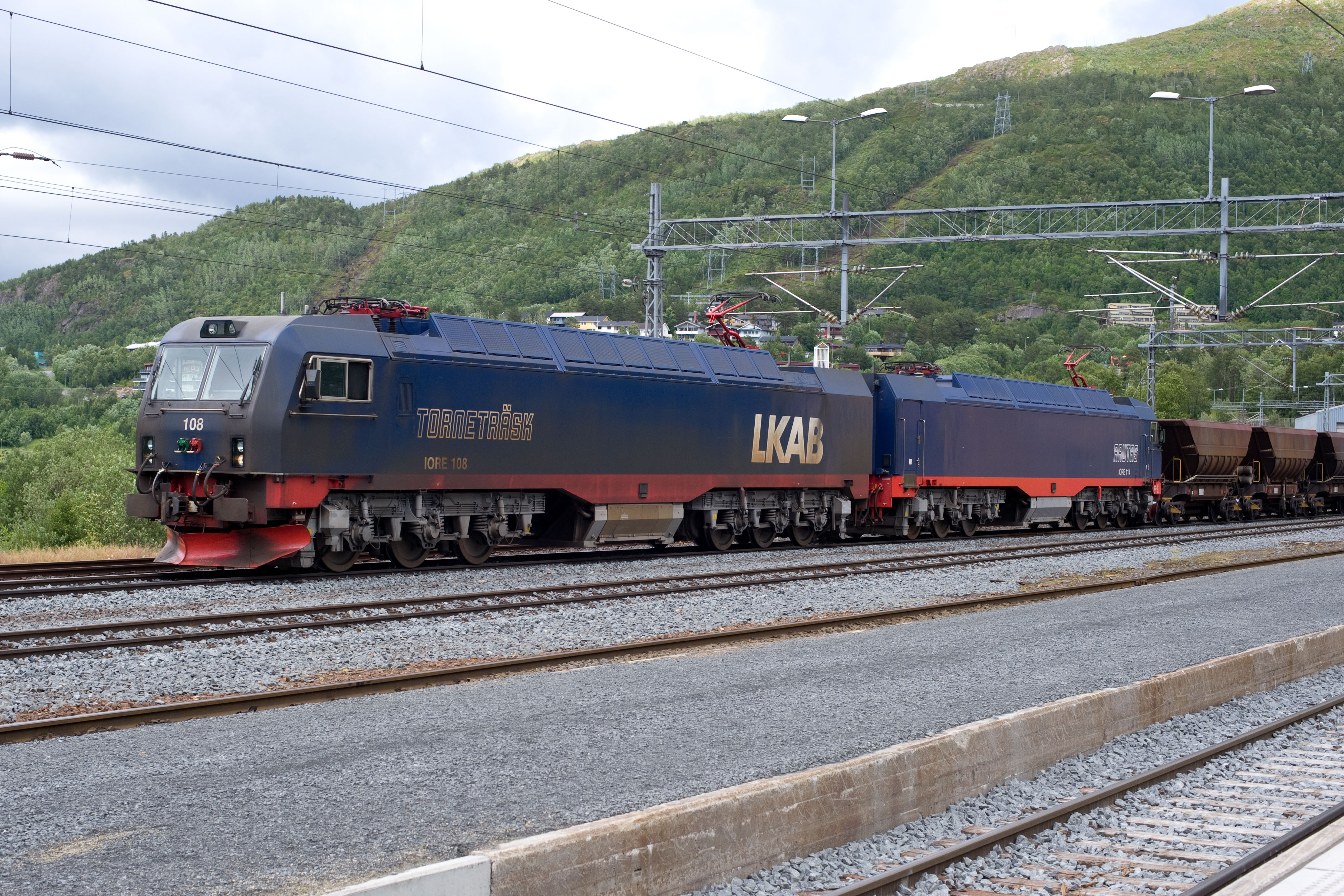 IORE 108 "Rautas" + IORE 114 "Torneträsk"